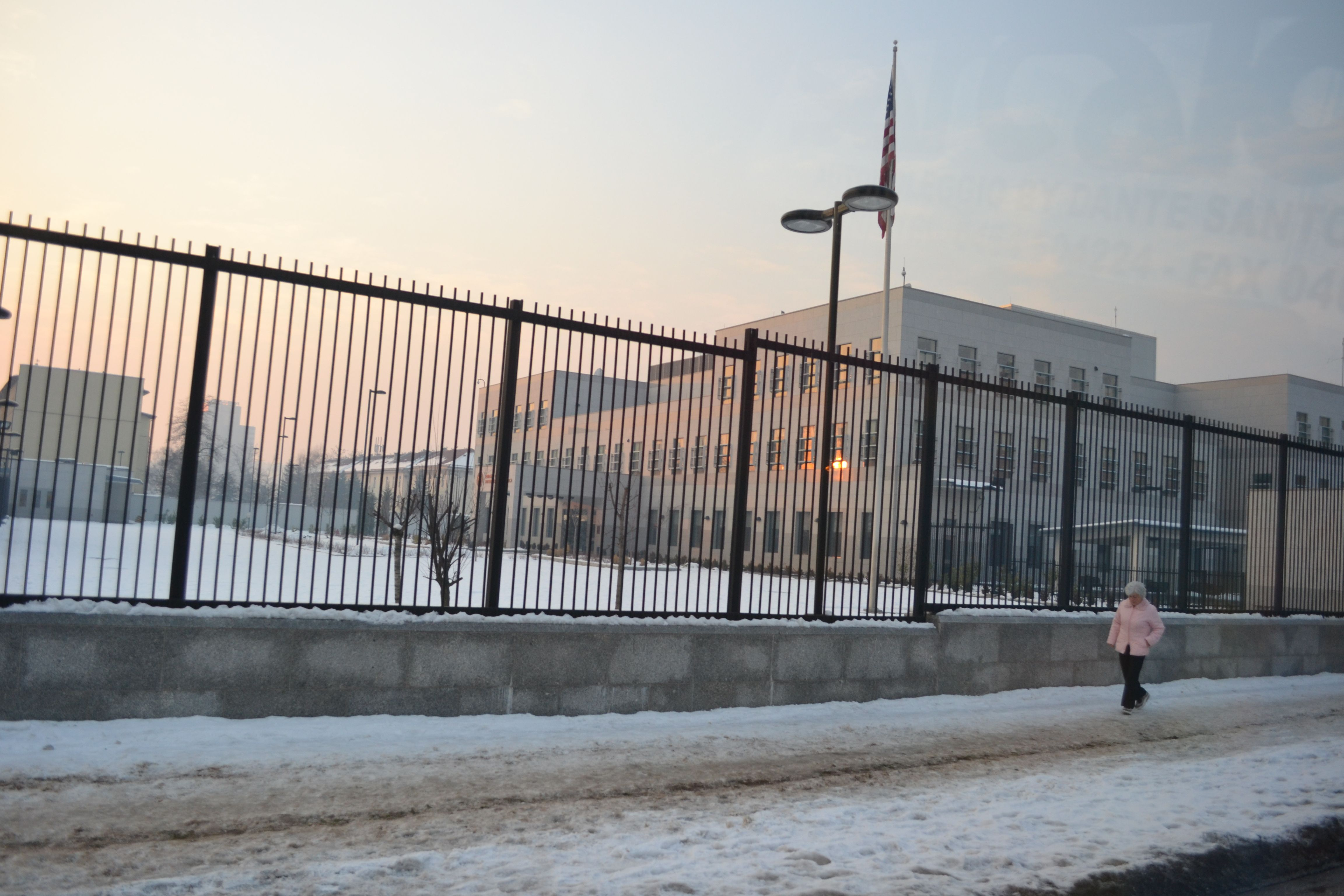 Ambasciata americana, Sarajevo